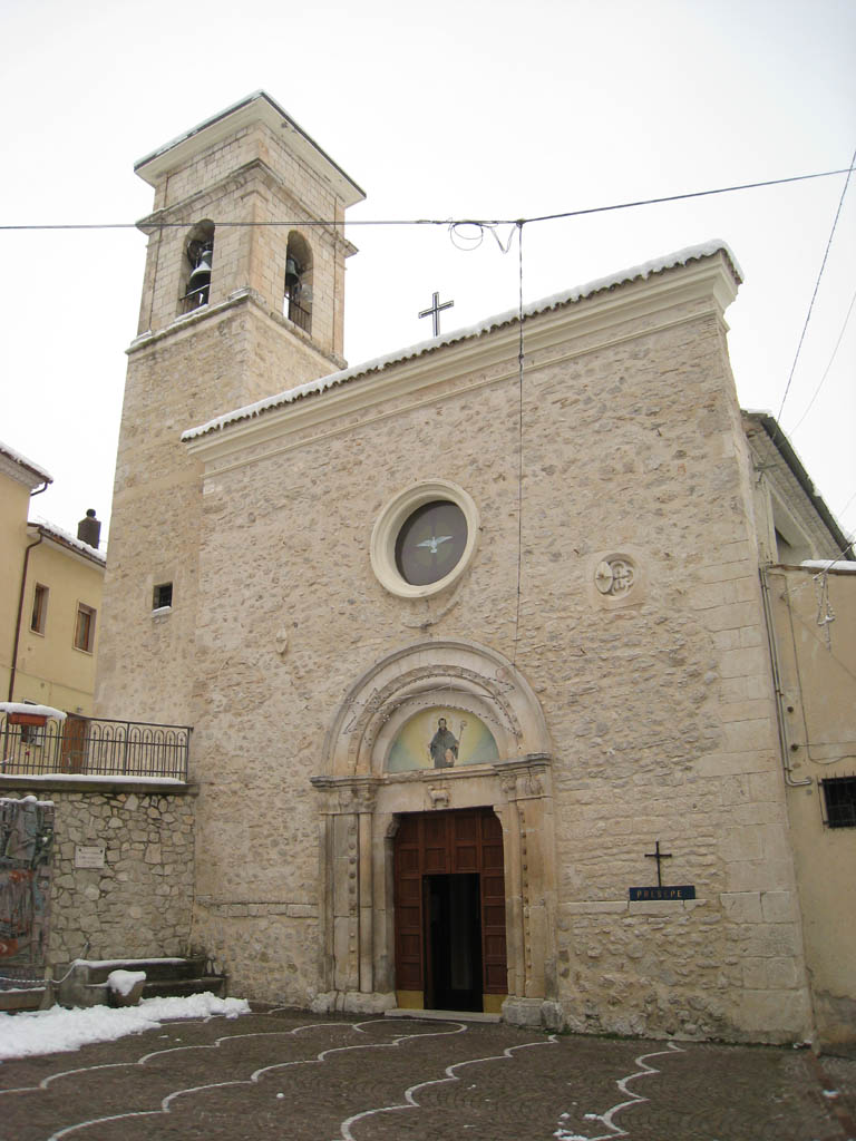 Facciata della Chiesa della Madonna di Loreto a Villalago